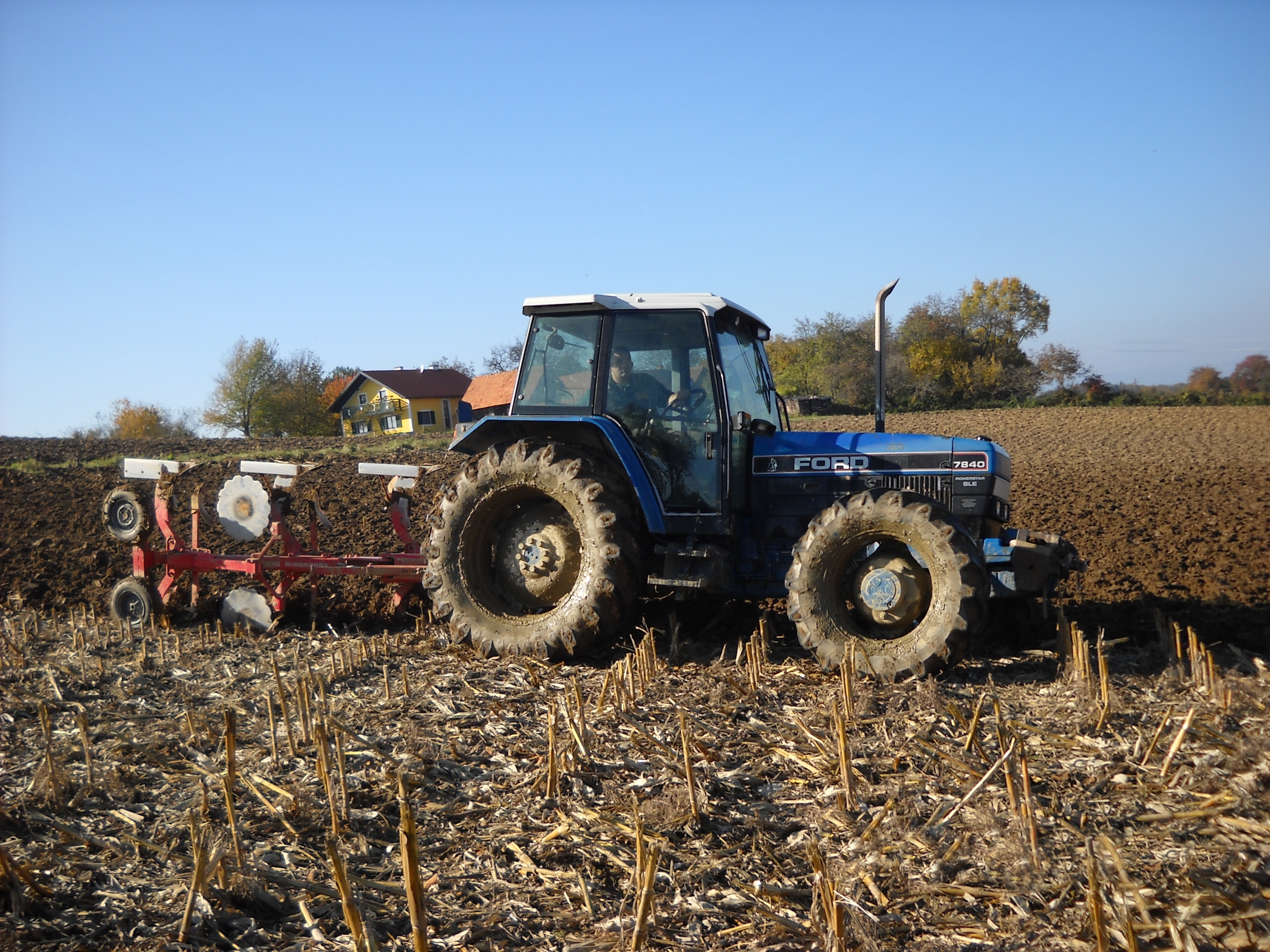 Ford-Traktor 7840 SLE Powerstar (Baujahr 1994) mit Landsberg-Pflug (Pöttinger) Servo 2S; Pflügen eines abgeernteten Maisfelds in der Steiermark, Österreich